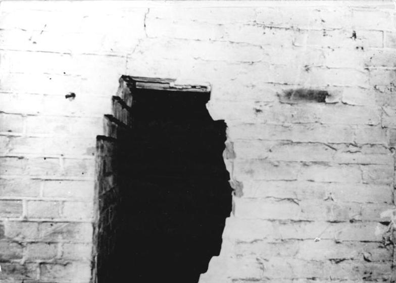 Zentralbild-Repro-1.2.1962. Gefährliche Provokation an der Staatsgrenze der DDR-Durch Agentenschleuse Eisenbahnverkehr aufs äusserste gefährdet. Ein neues eklatantes Beispiel für die friedensgefährdende Rolle der Westberliner Frontstadt-Politik ist am 1.2.1962 auf einer internationalen Pressekonferenz in Berlin enthüllt worden. Vor in- und ausländischen Journalisten, darunter Vertretern westdeutscher Zeitungen informierte der Minister für Verkehrswesen der DDR, Erwin Kramer, auf dem Gelände des S-Bahnhofes Wollankestrasse über die ungeheuerliche Tatsache, dass Westberliner Banditen unter gröbster Verletzung der Staatsgrenze der DDR durch die Gewölbe dieses Bahnhofes ein Stollensystem vorgetrieben haben. Durch die Anlage dieses Stollensystems sollten Agenten und Diversanten von Westberlin in das Gebiet der DDR eingeschleust werden. UBz.: Aufnahme vom Mauerdurchbruch, welcher in den 8. S-Bahnbogen führt. Durch diesen Mauerdurchbruch können die anderen 14 S-Bahnbogen betreten werden.